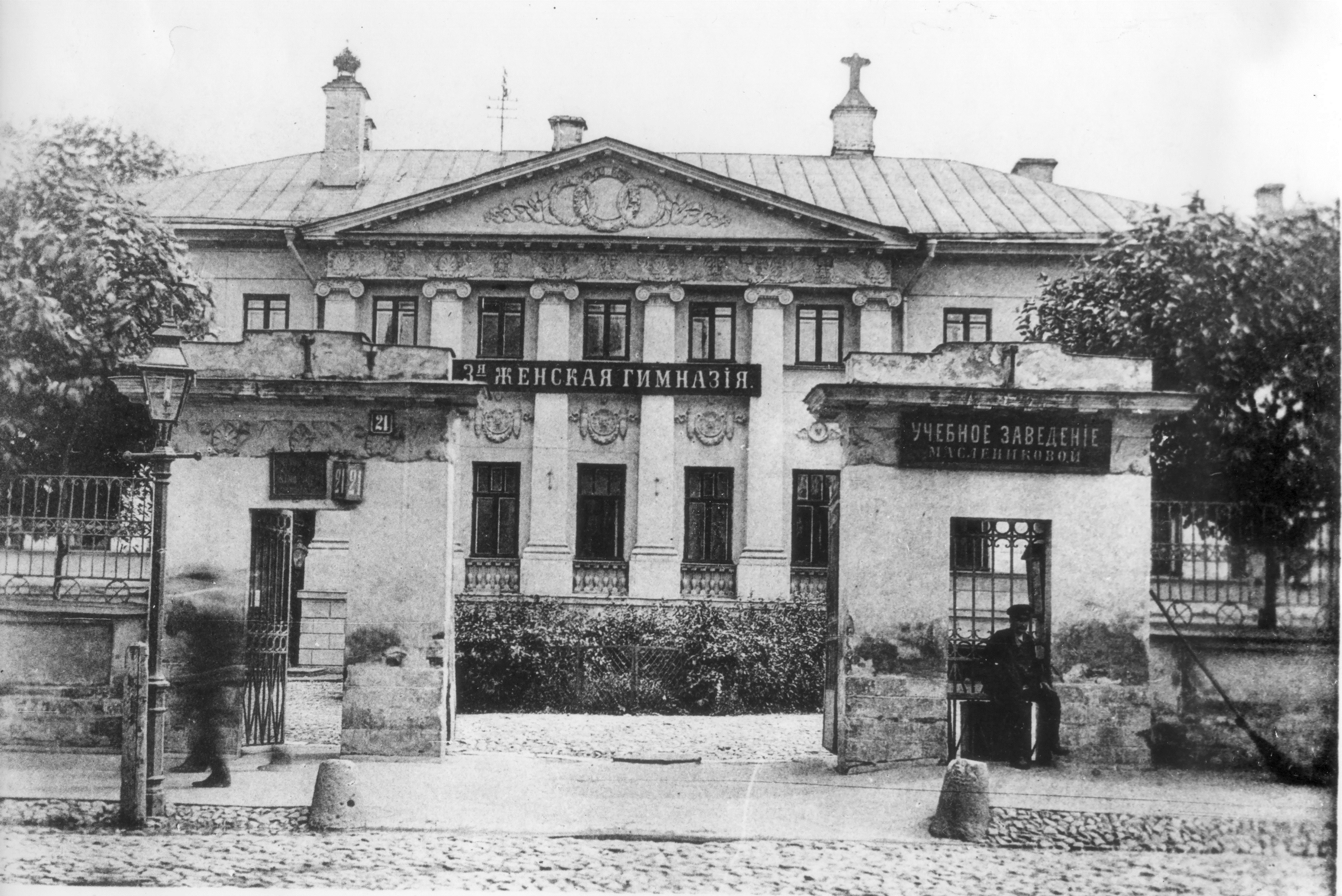 Усадьба Долгова — Жемочкина